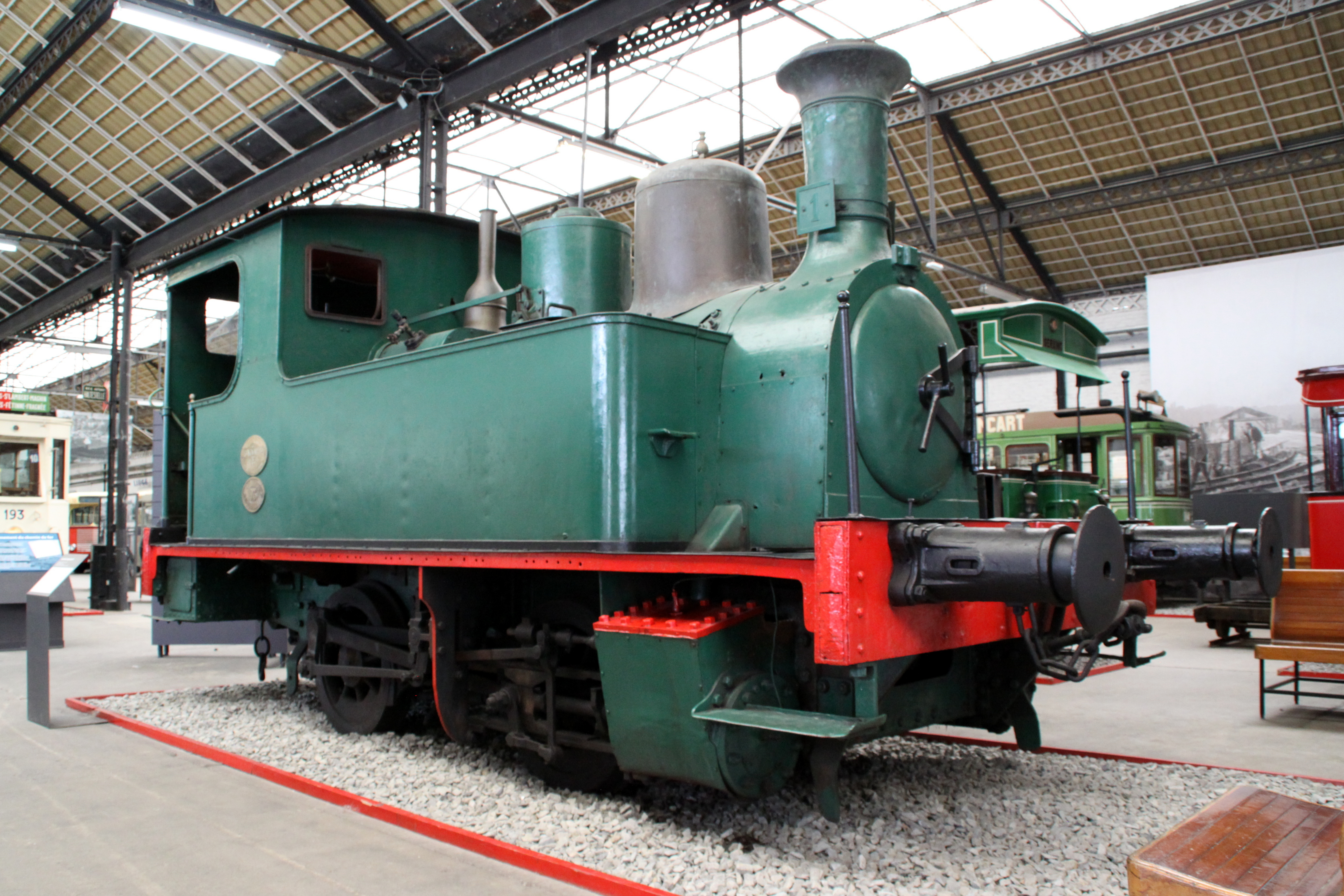 Lokomotiv Type 15 am Tramsmusée zu Léck, eng vun de wéinegen Normalspurlokomotive vun der SNCV